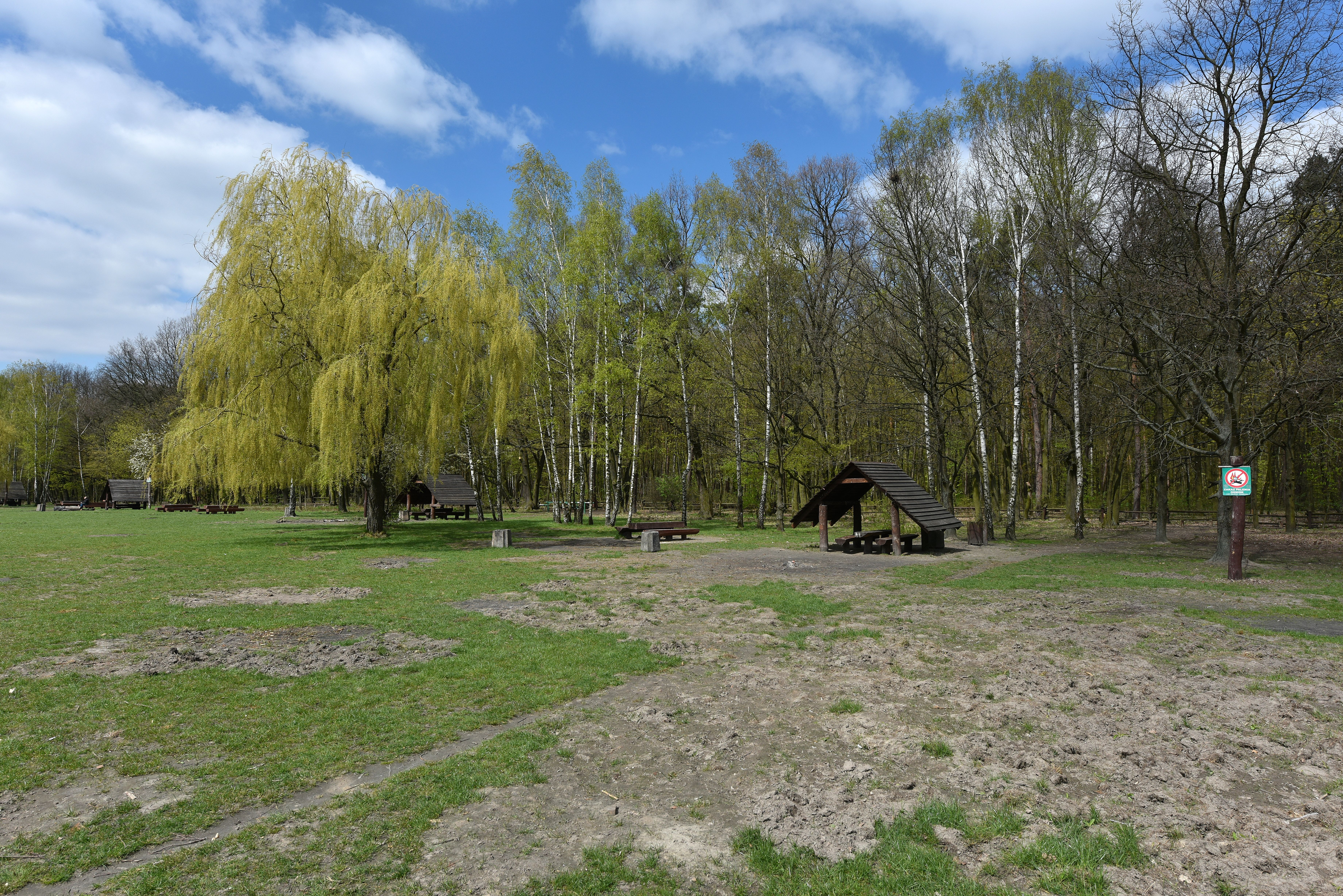 Brzeg Lasu Kabackiego w Warszawie